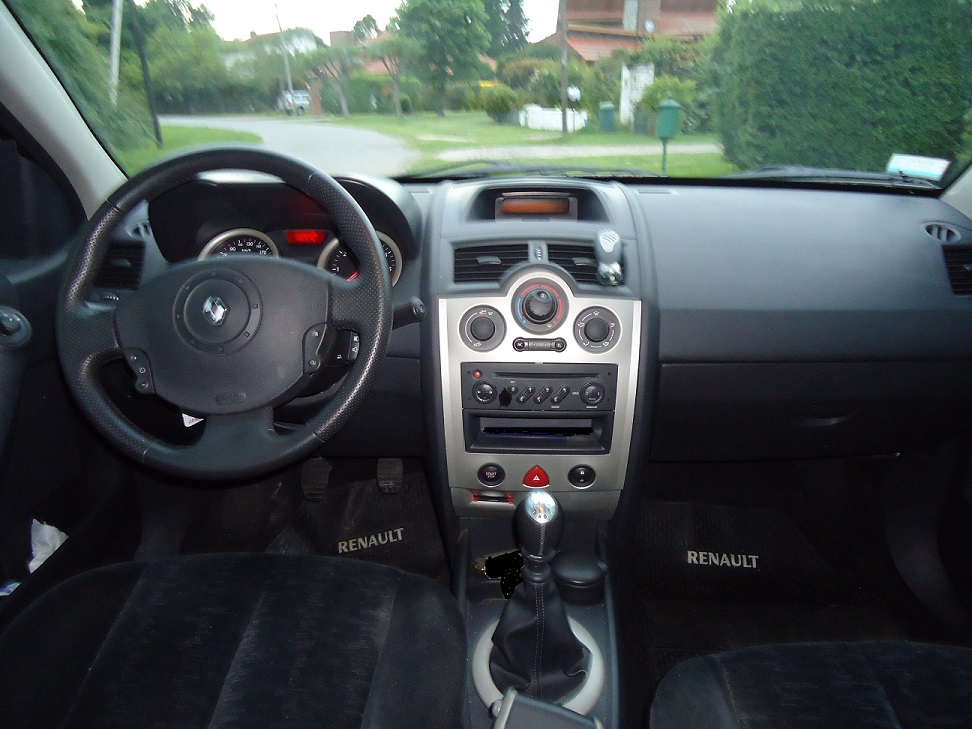 Tablero Megane II